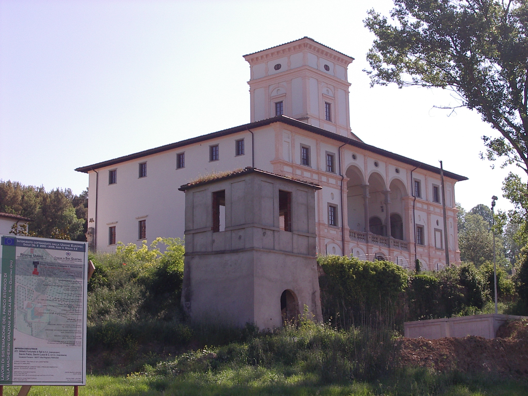 San Giustino Villa Graziani Ombrie Italy